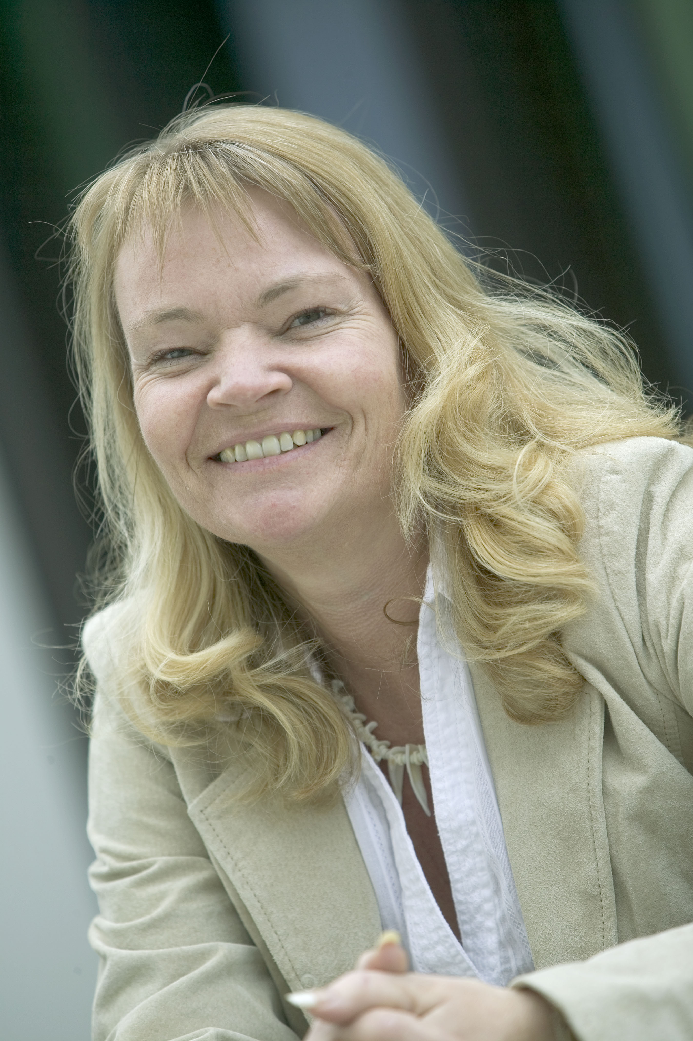 Kari Kjønaas Kjos, FrP-politiker